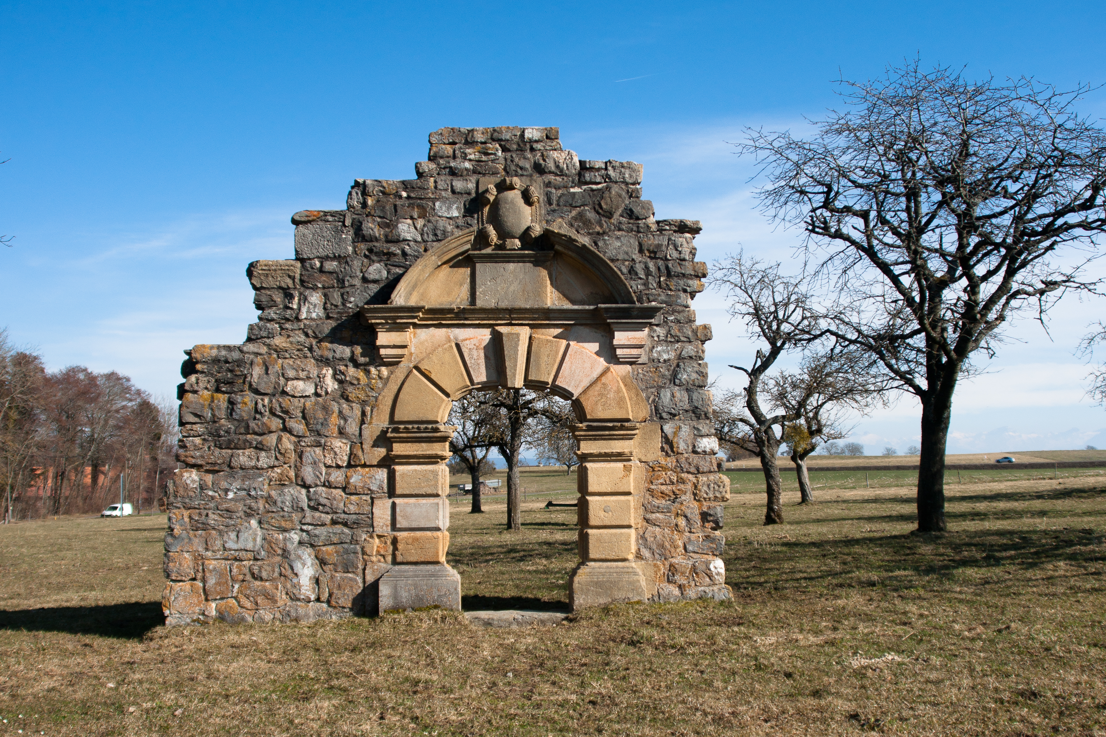 Cuarnens, canton de Vaud, Suisse. Porte du château de la Grange.